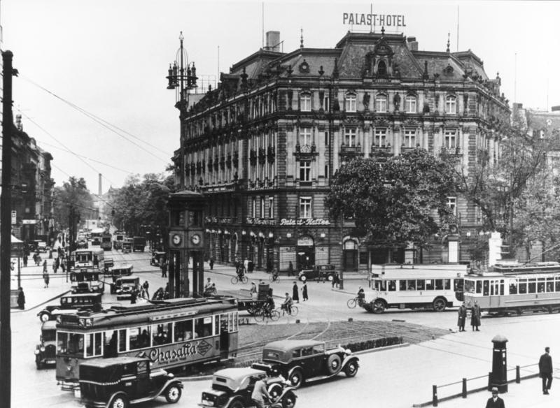 Berlin; Potsdamer Platz, in den zwanziger Jahren einer der verkehrsreichsten Plätze Europas. Nach Kriegsende völlig eingeebnet, steht hier heute die Berliner Mauer. 1930